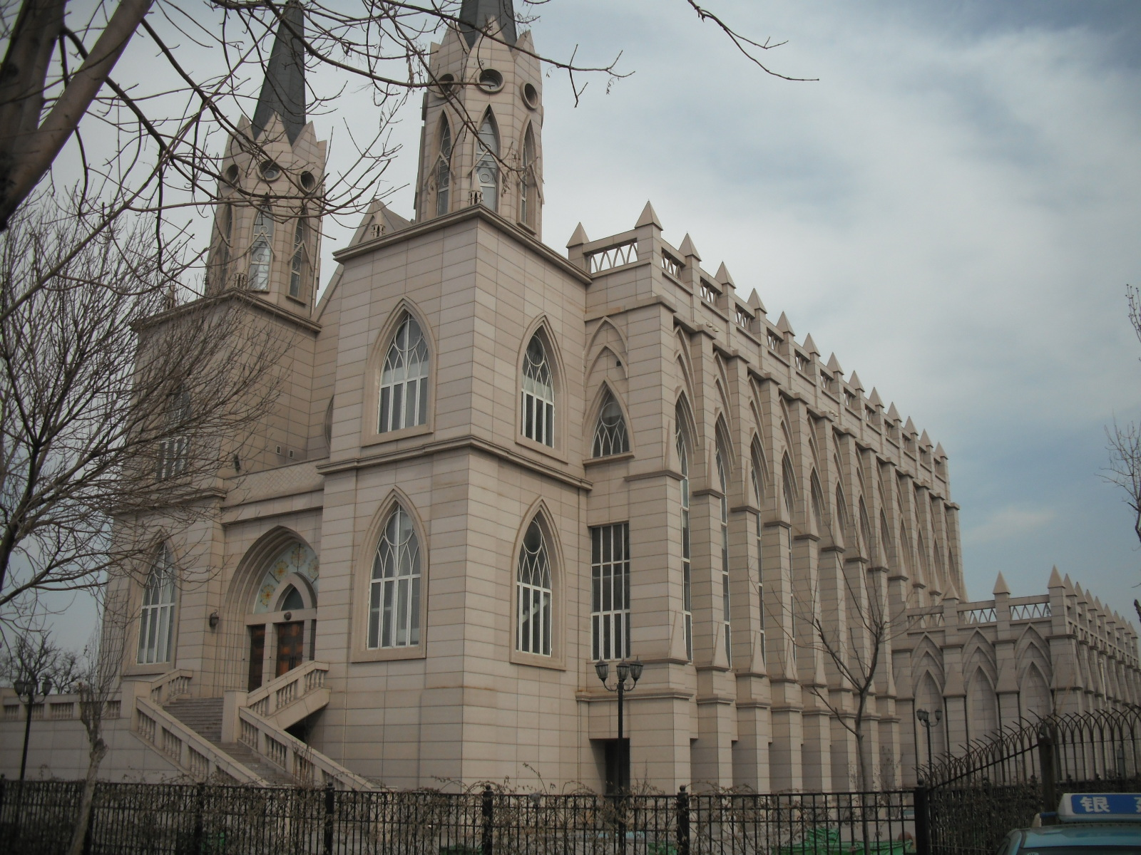 塘沽堂南面。